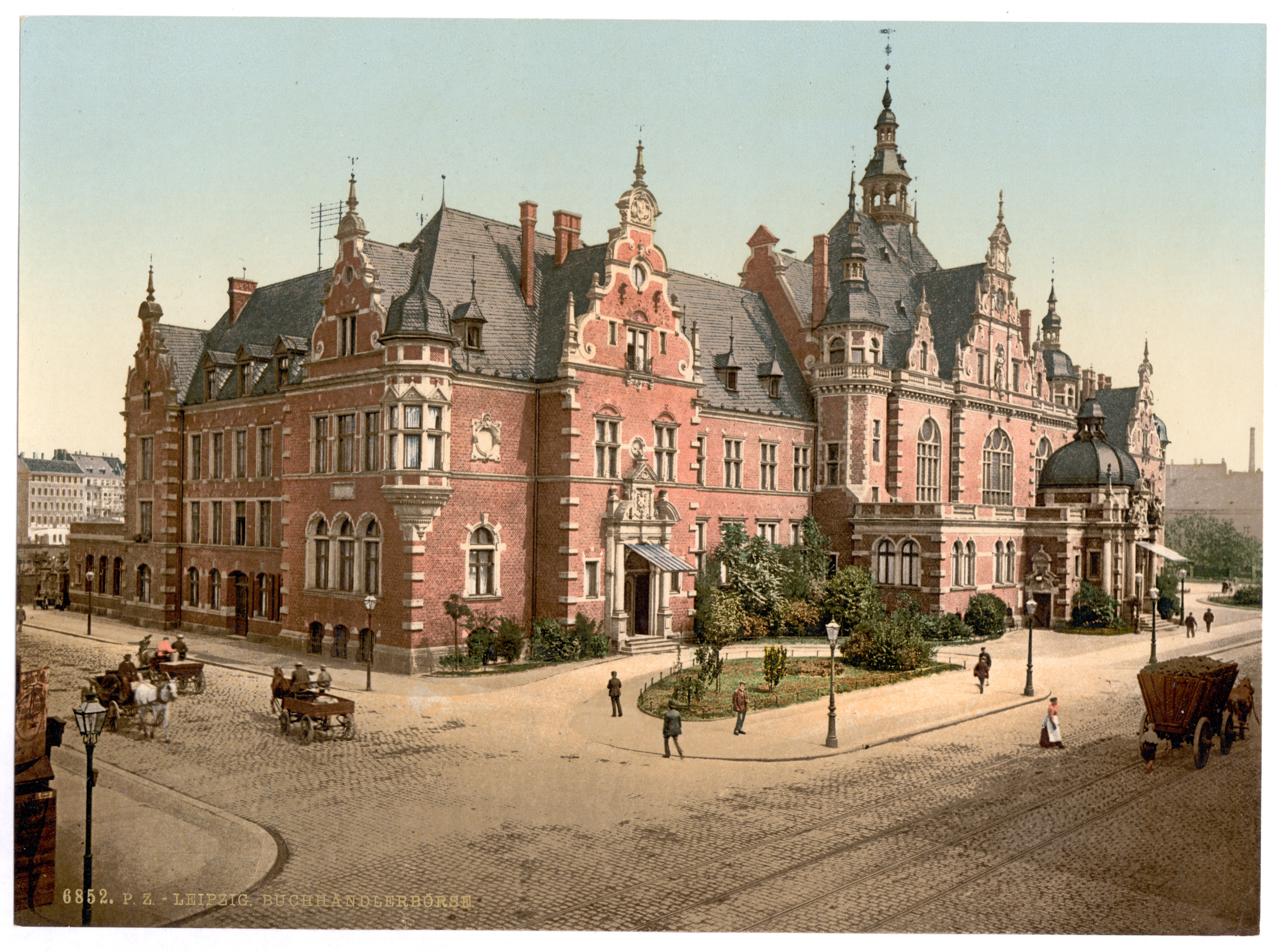 Deutsches Buchhändlerhaus in Leipzig um 1900, erbaut 1888 als Sitz der Buchhändlerbörse. Es befand sich im ehemaligen Graphischen Viertel und wurde 1943 bei einem Bombenangriff zerstört.